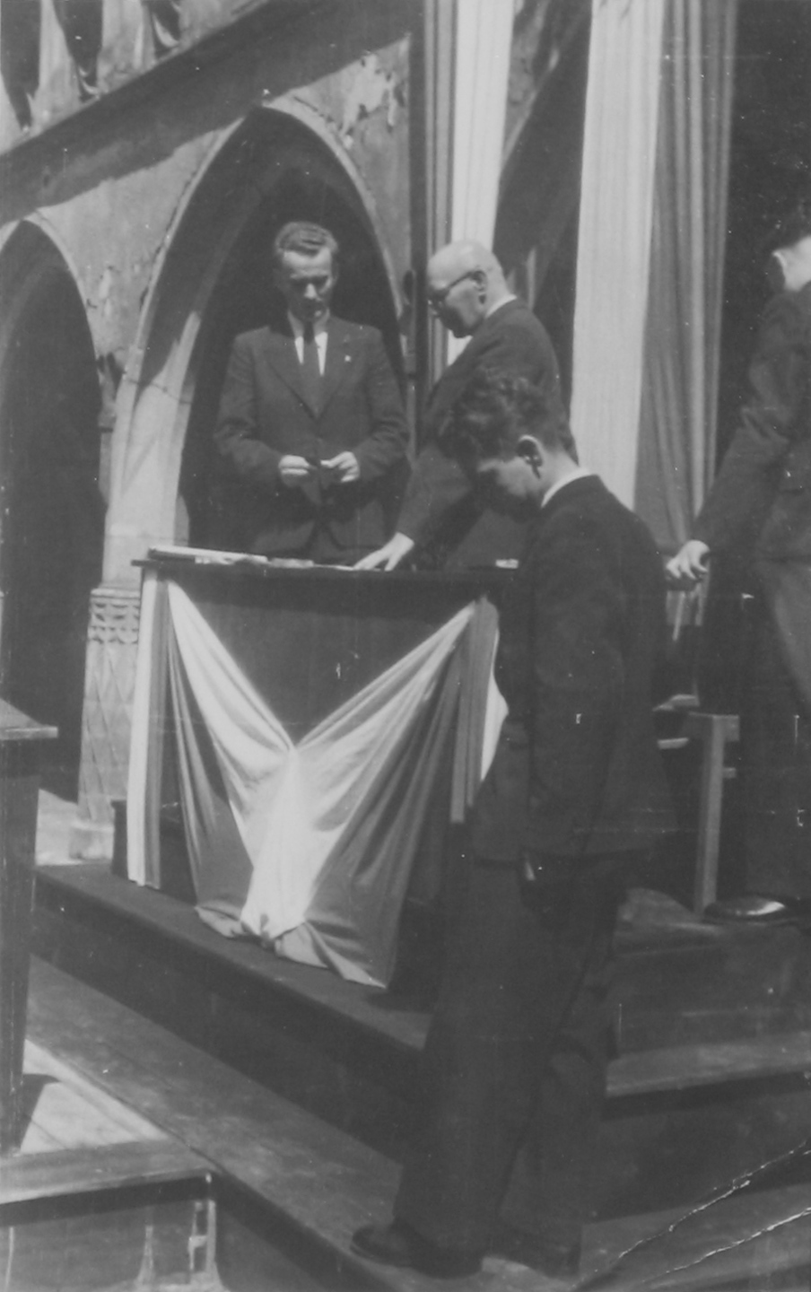 Uroczystość Bratniej Pomocy Studenckiej na Uniwersytecie Jagiellońskim, maj 1947. Od lewej: Jan Deszcz (prezes Bratniaka), prof. Stanisław Pigoń (opiekun organizacji), na pierwszym planie Henryk Zieliński (wiceprezes Bratniaka)